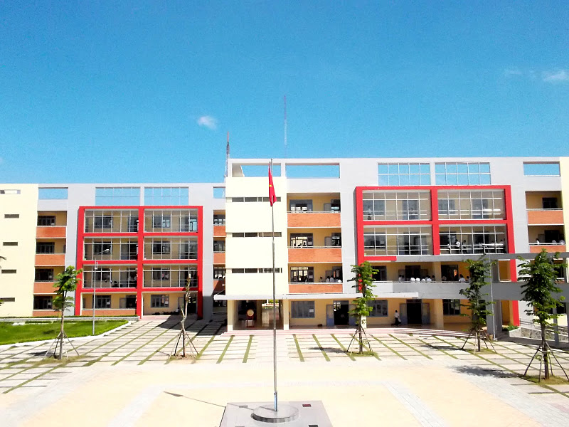 Mặt tiền Trấn Biên